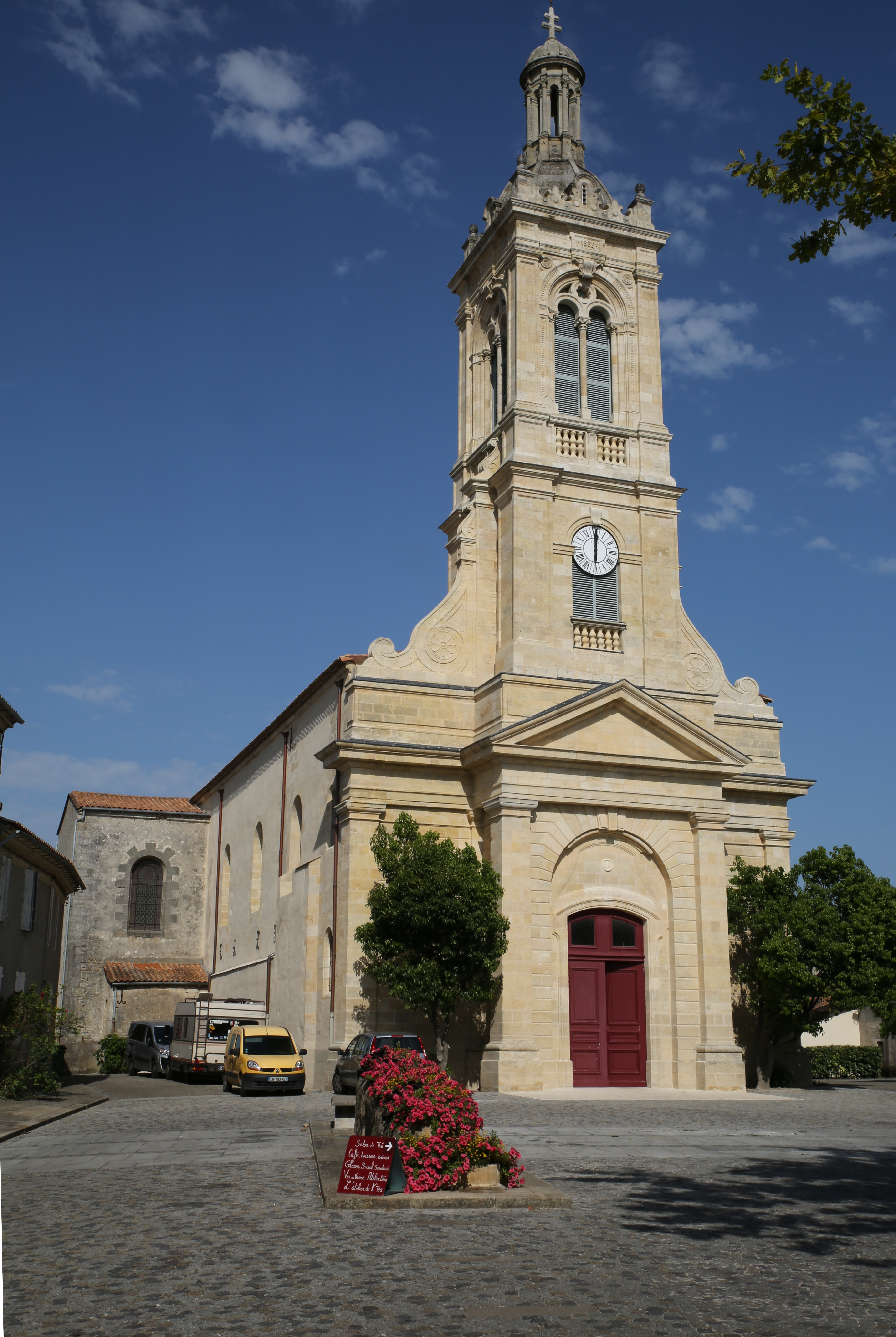 Eglise de Saint-Estèphe